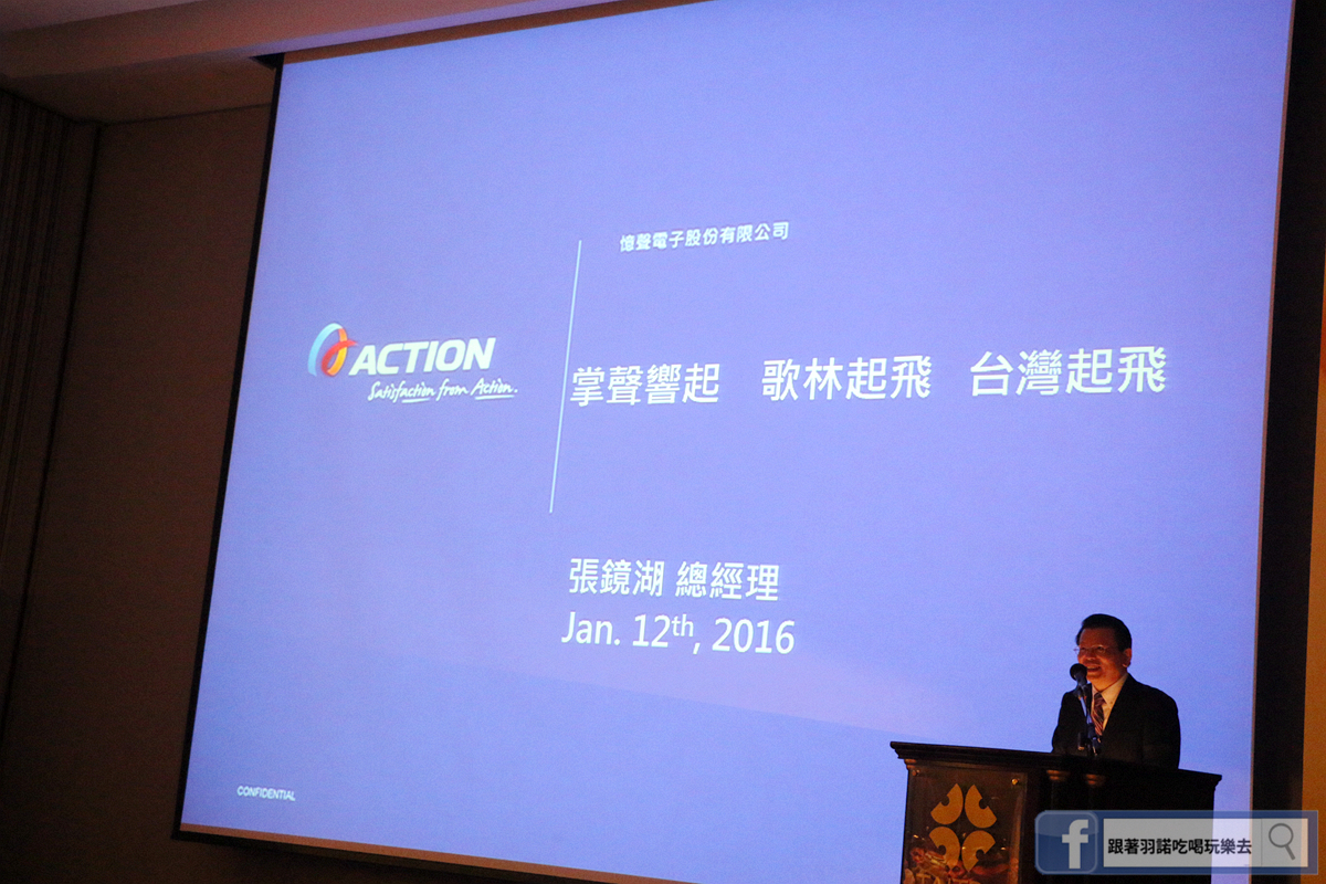 中文（台灣）: 憶聲電子總經理張鏡湖出席2016歌林新商品發表會及感恩大會。